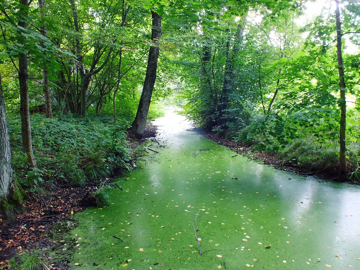 Дубае. Водная сістэма